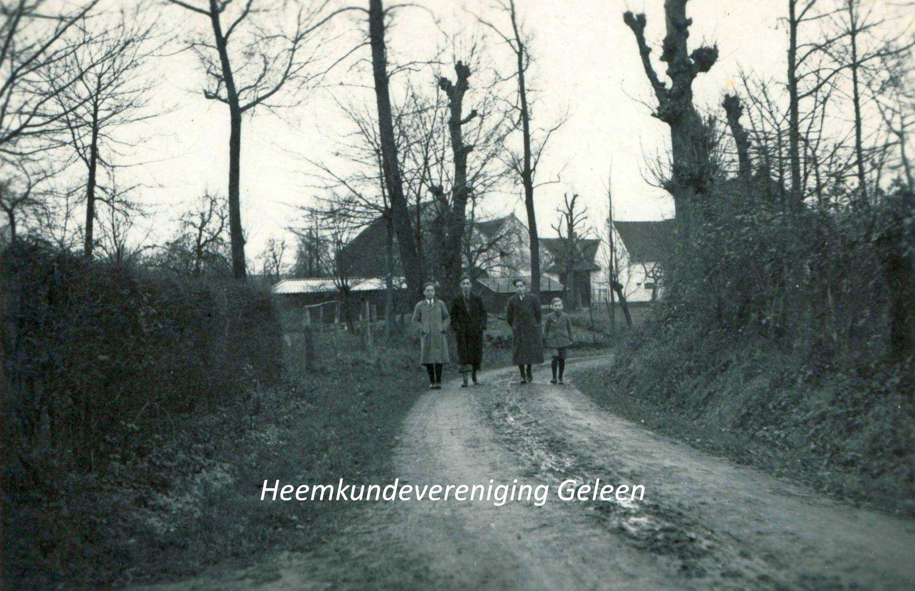 Foto eigendom collectie Heemkundevereniging Geleen